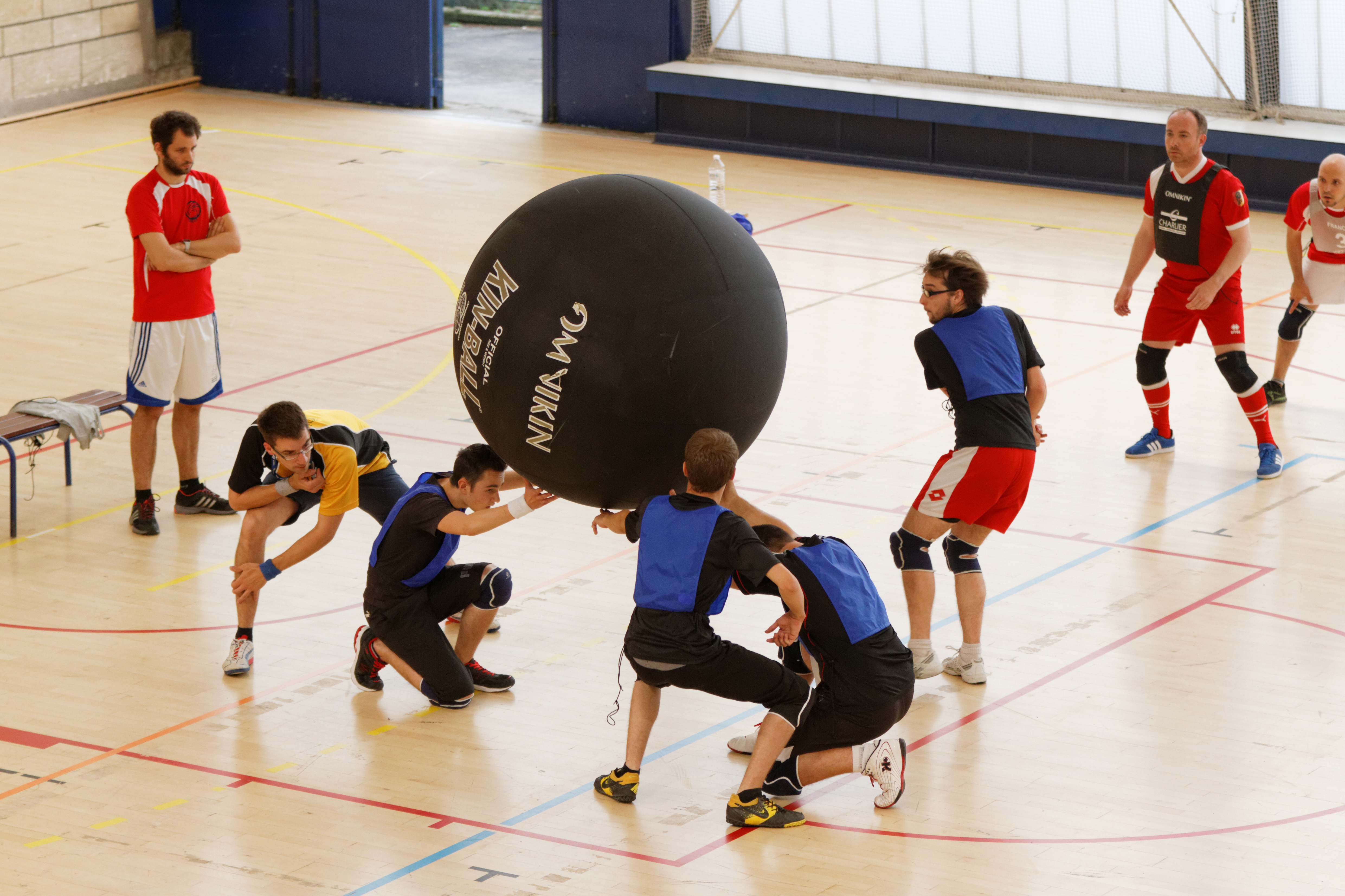 20e journée du championnat de France 2013-2014 de Kin-Ball, 8 juin 2014, Gymnase George Carpentier, Paris.